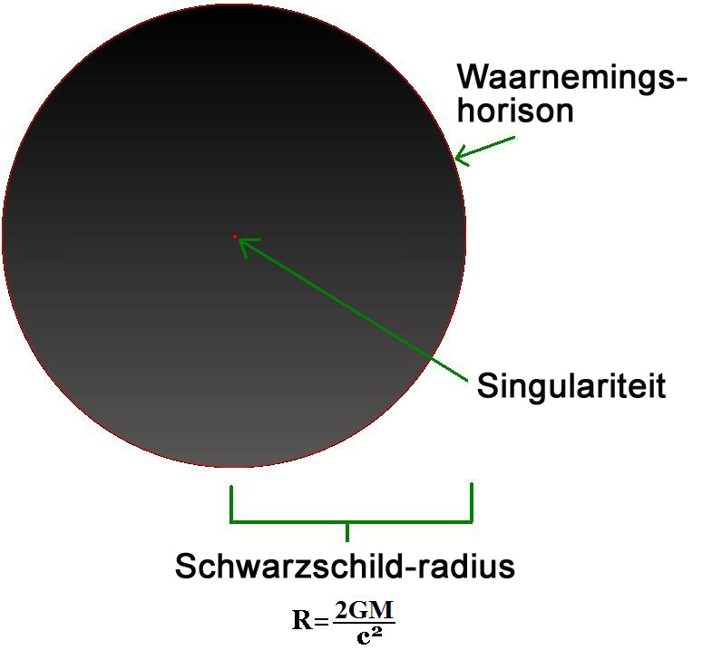 Detail van 'n swartkolk